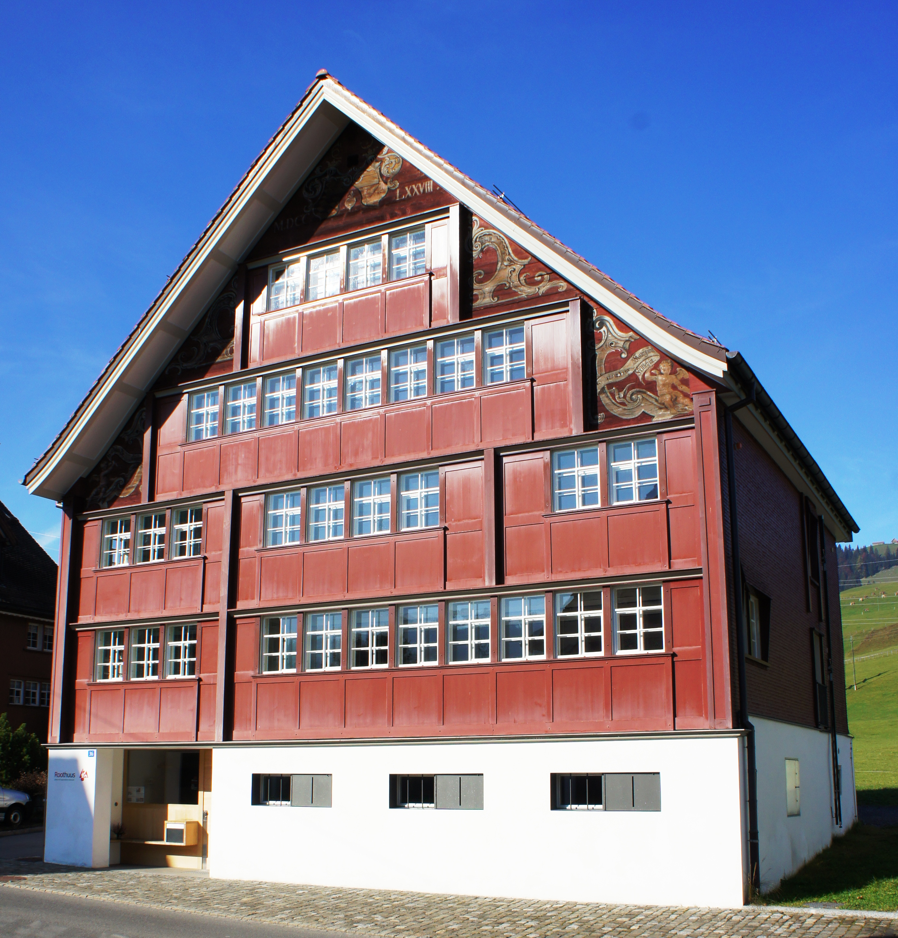 Blick aus Südosten auf das Bürgerhaus Roothuus an der Dorfstrasse 36 in Gonten. Das Erdgeschoss ist gemauert (weiss), der obere Teil aus Holz und in kräftiger roter Farbe. Die Nordostfassade ist mit Holzschindeln beschlagen. Auf der Hauptfassade (Südost) sind unter dem Vordach Malereien zu sehen. Unter dem Gibel ist folgende Jahreszahl angegeben; MDCC LXXVIII (1778). Das Haus hat über dem Eingang (links im Erdgeschoss) noch vier Stockwerke, zwei davon im Dachstock.